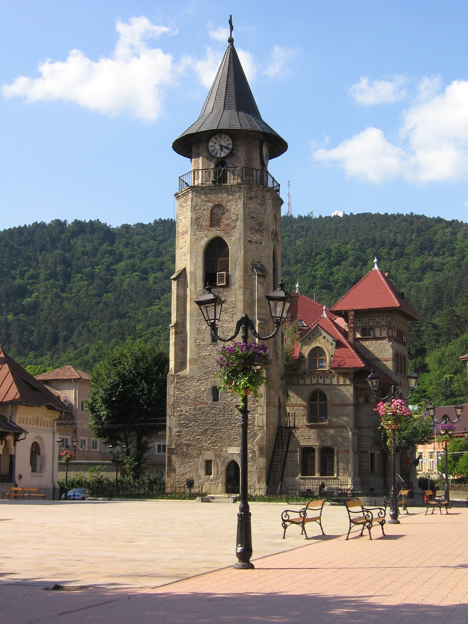 Turnul lui Stefan, Piatra Neamţ